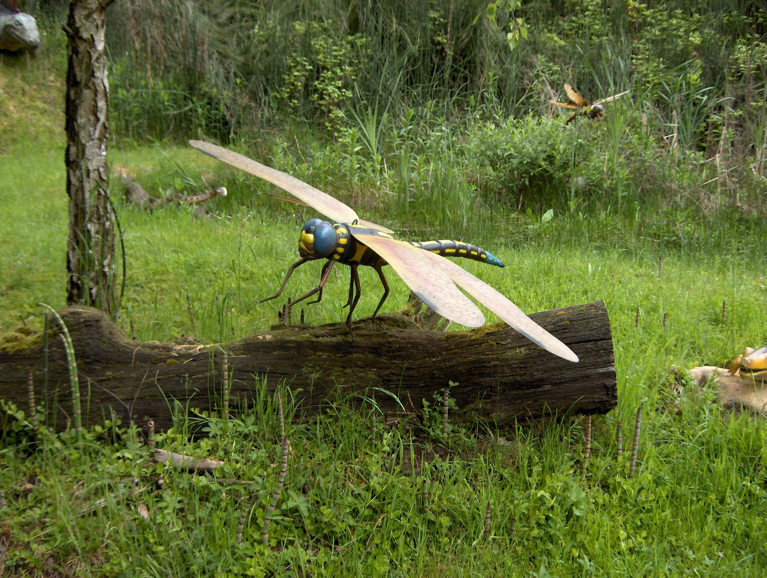 Modell einer Meganeura in Münchehagen